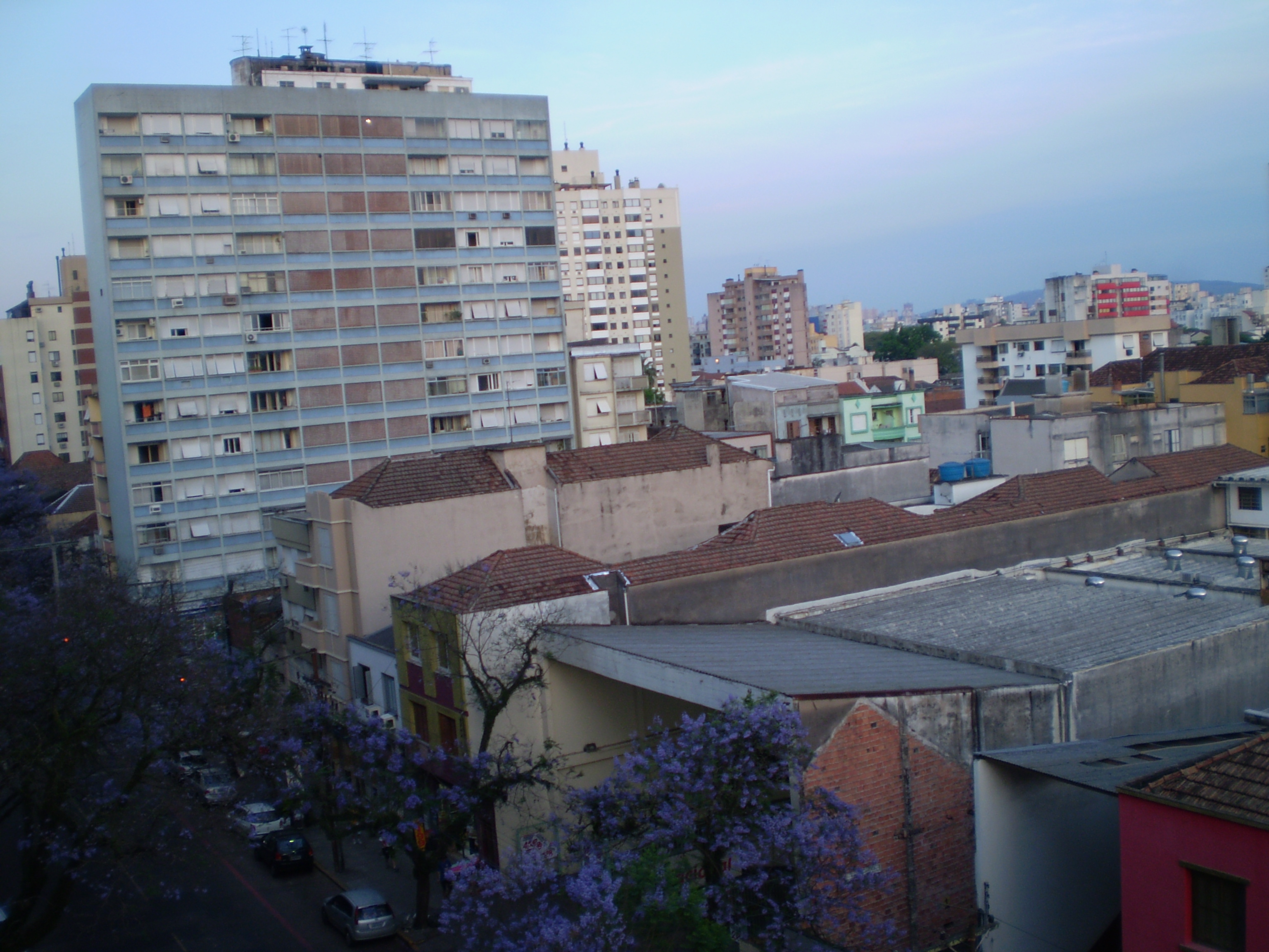 Bairro de Porto Alegre Cidade Baixa.